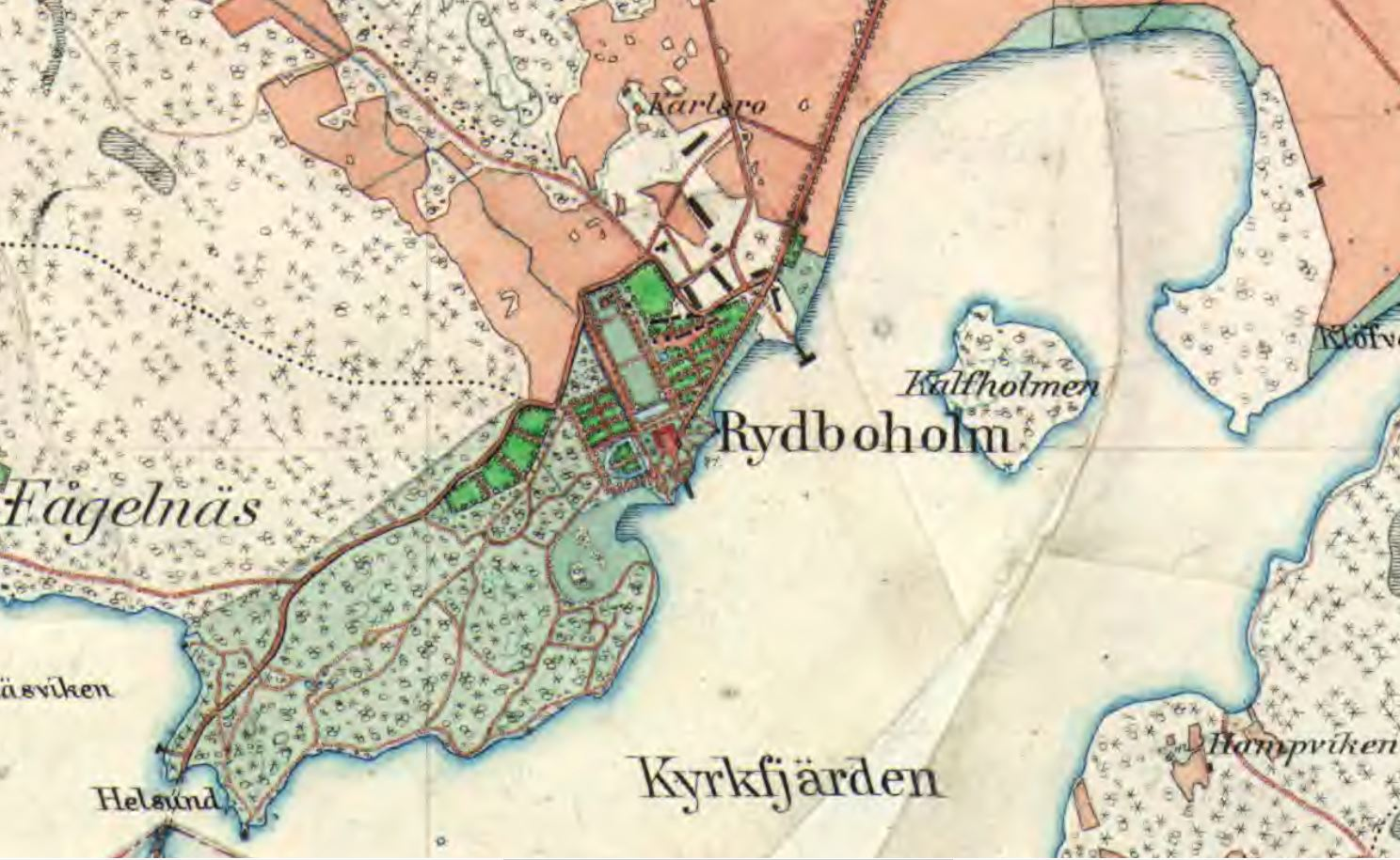 Karta över Rydboholm 1901-06